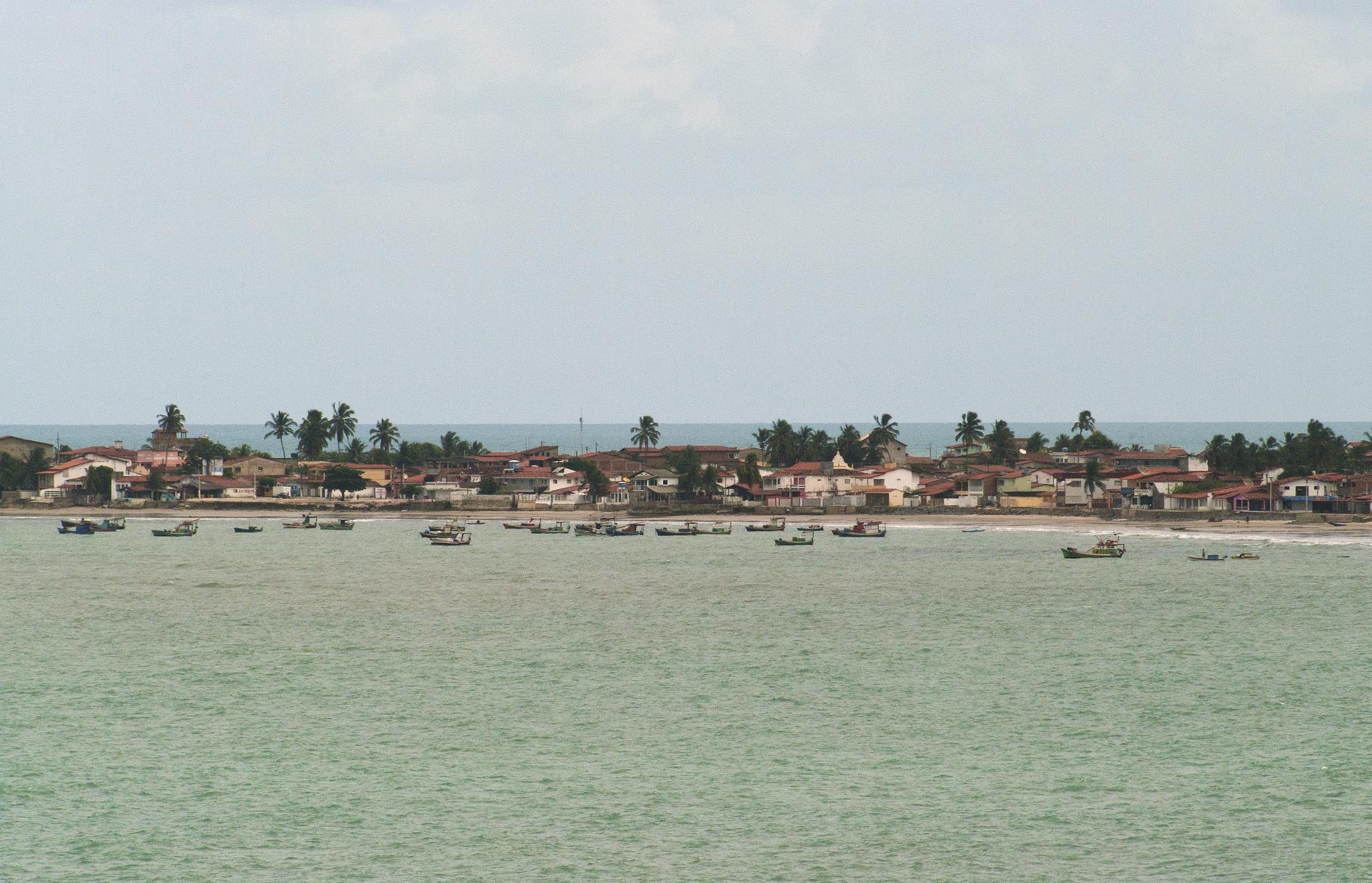 Panorama de Baía da Traição, Paraíba, Brasil.